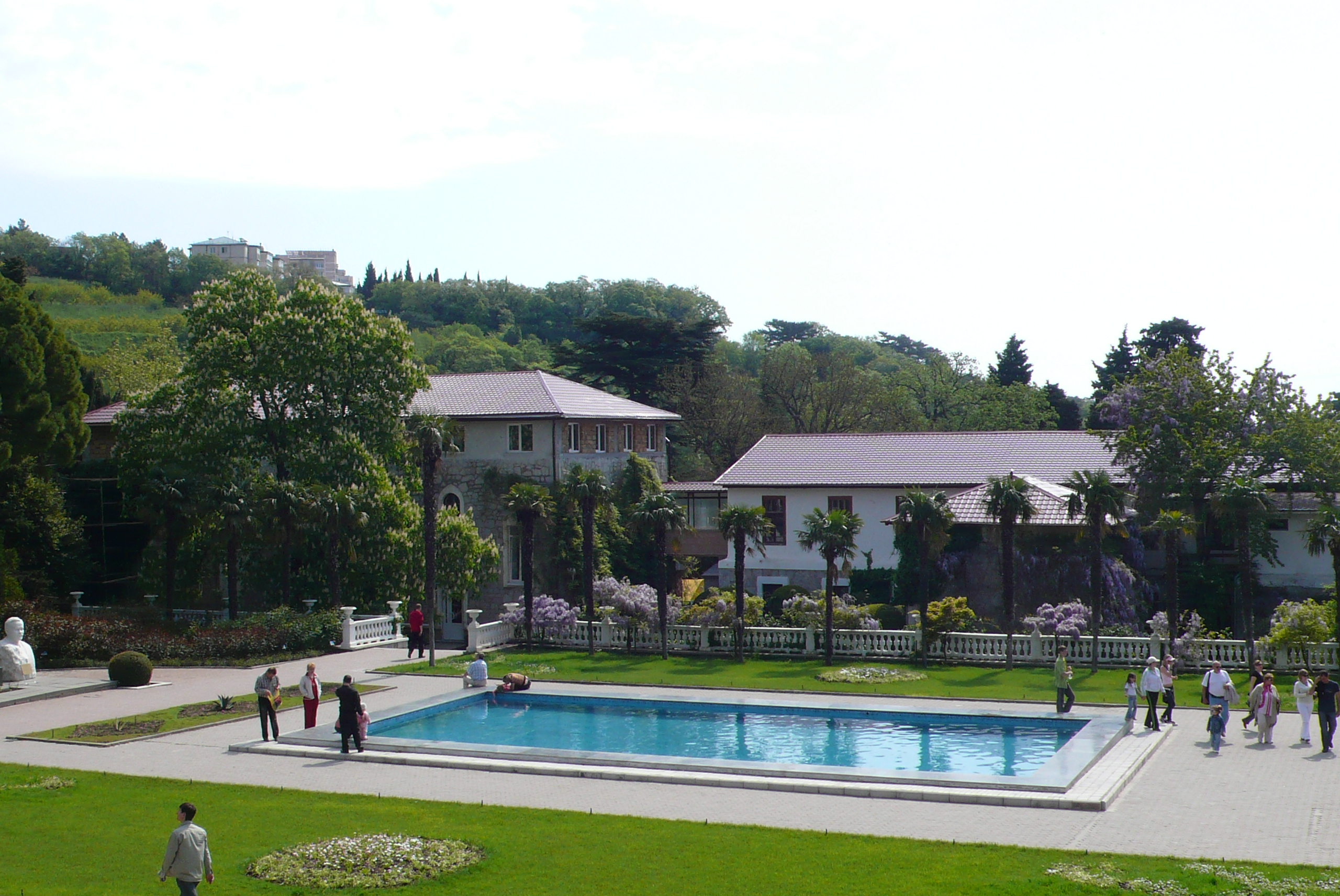 Никитский ботанический сад